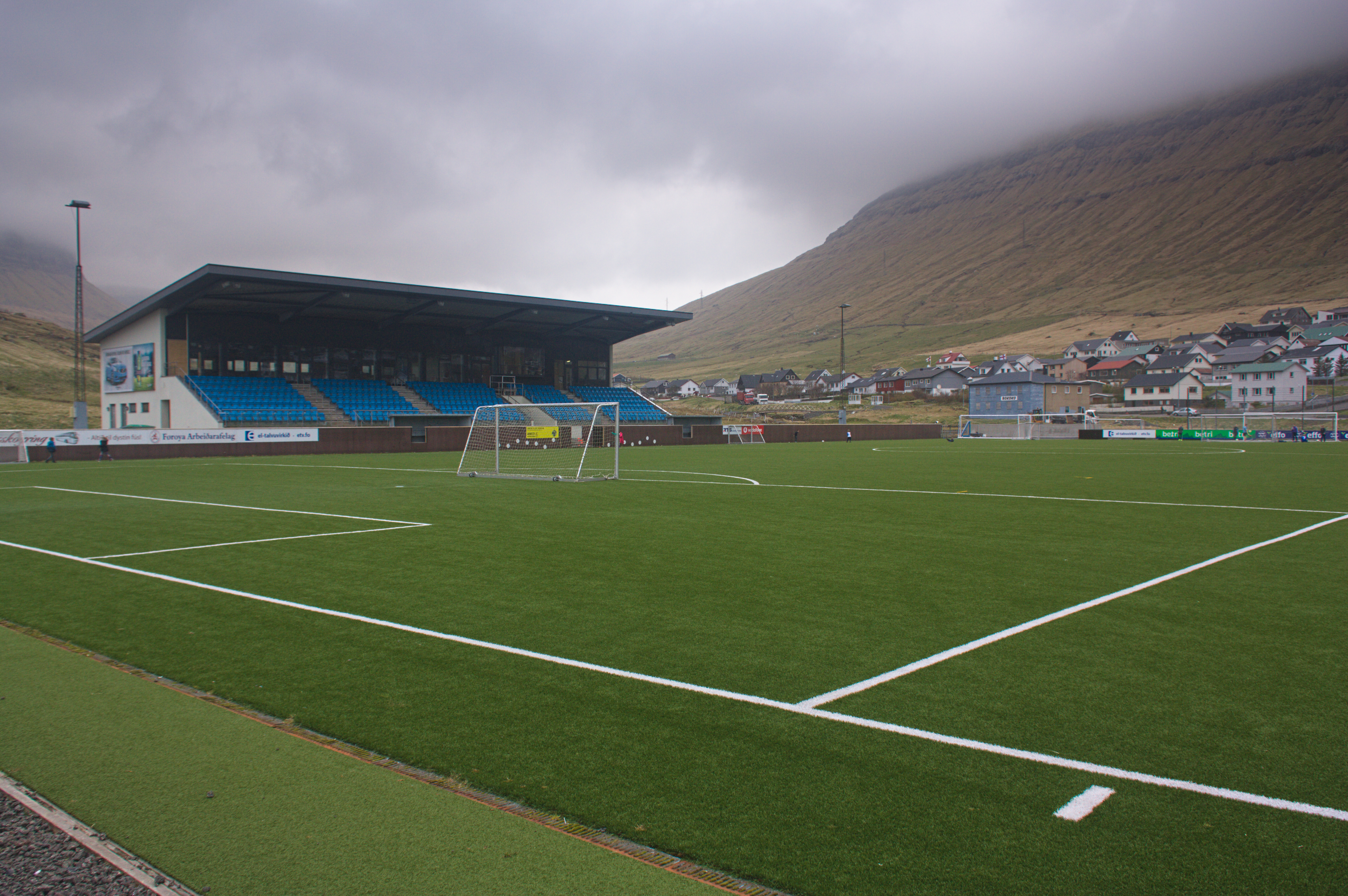 Stadion klubu Víkingur Gøta, aktualnego mistrza kraju. Jego siedziba mieści się w Leirvík, natomiast stadion w oddalonej o 5 km Norðragøta.